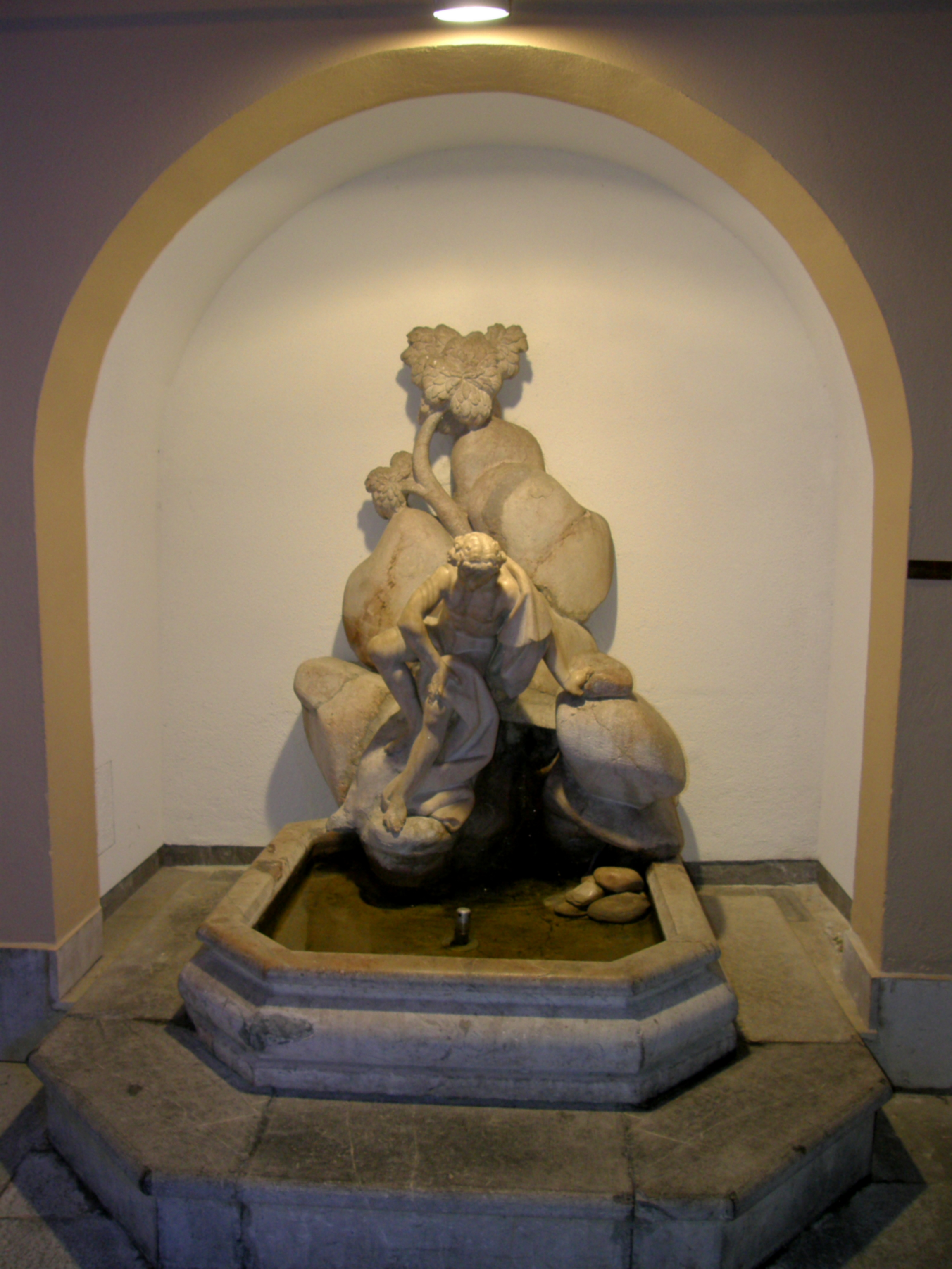 Narcissus Fountain in Ljubljana, Slovenia